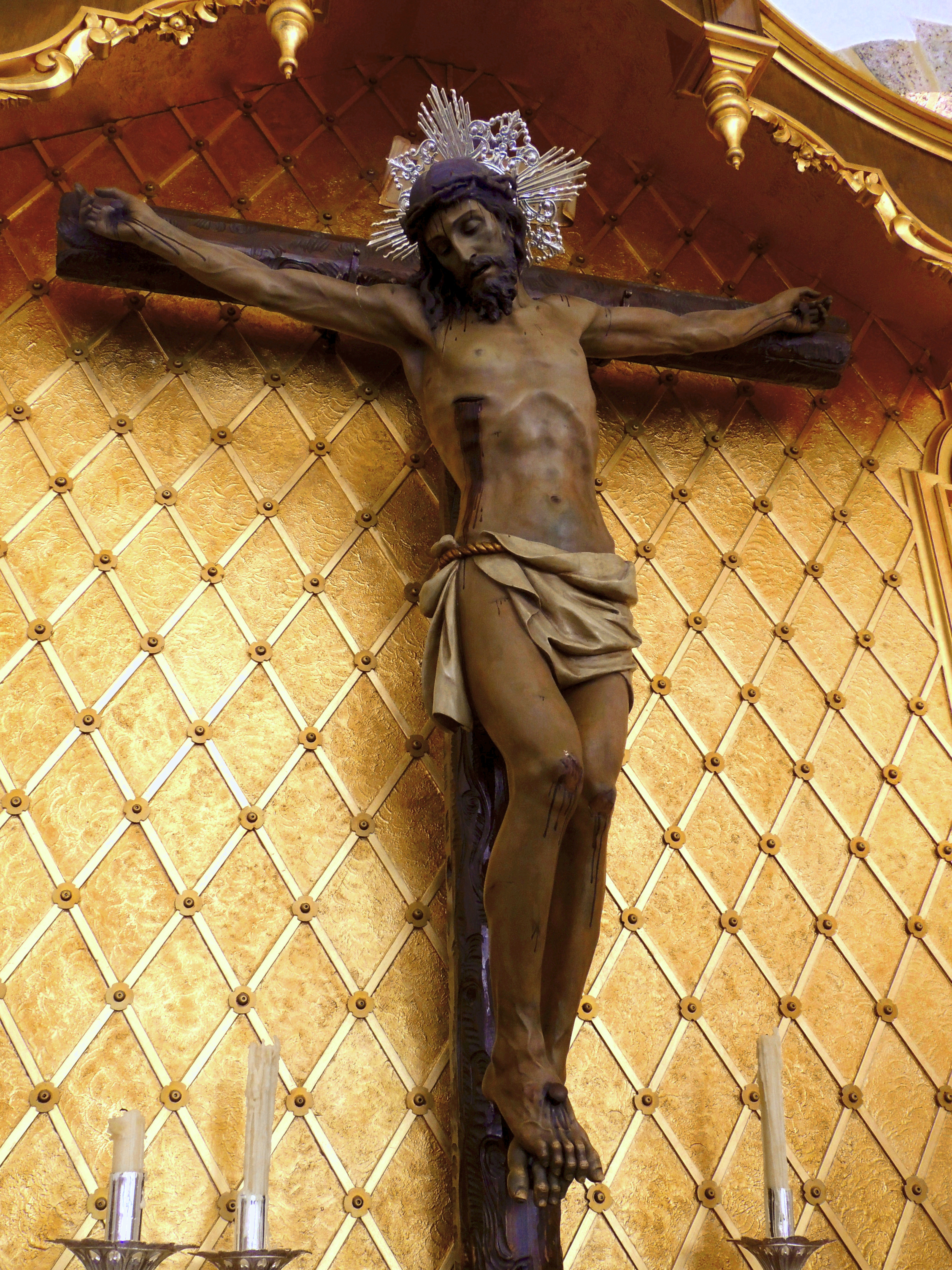 Cristo de la Vera-Cruz. Iglesia parroquial de Ntra. Sra. de la Asunción. Orcera